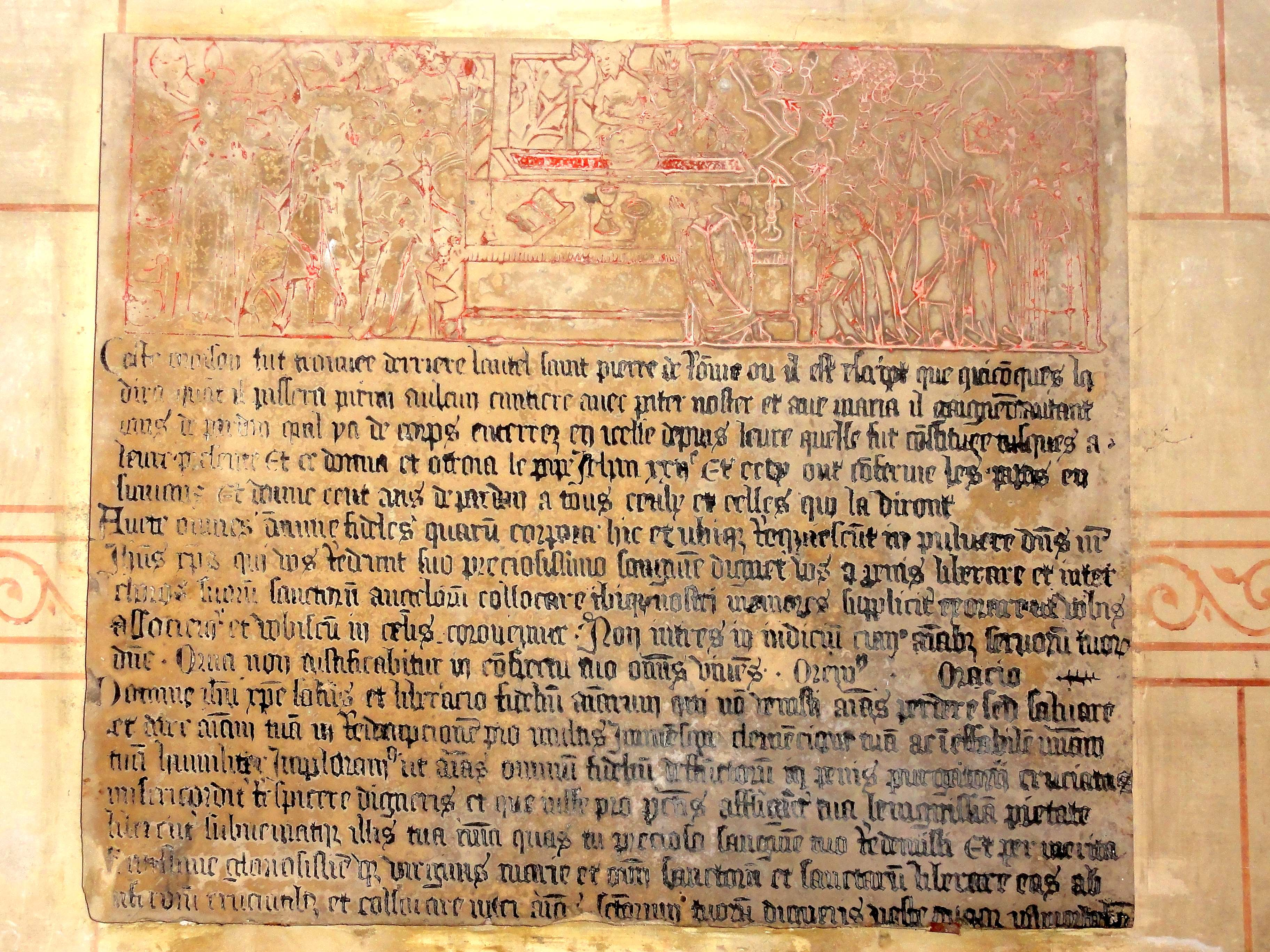 Mobilier de l'église (voir titre).